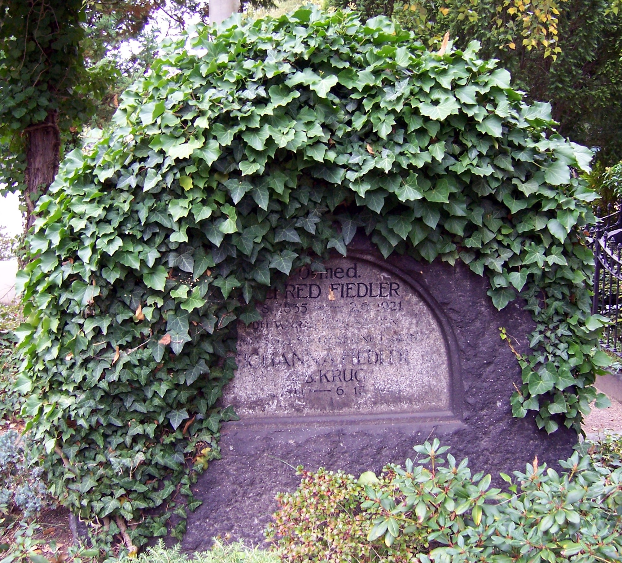 Grab des deutschen Mediziners Carl Ludwig Alfred Fiedler auf dem Trinitatisfriedhof in Dresden.